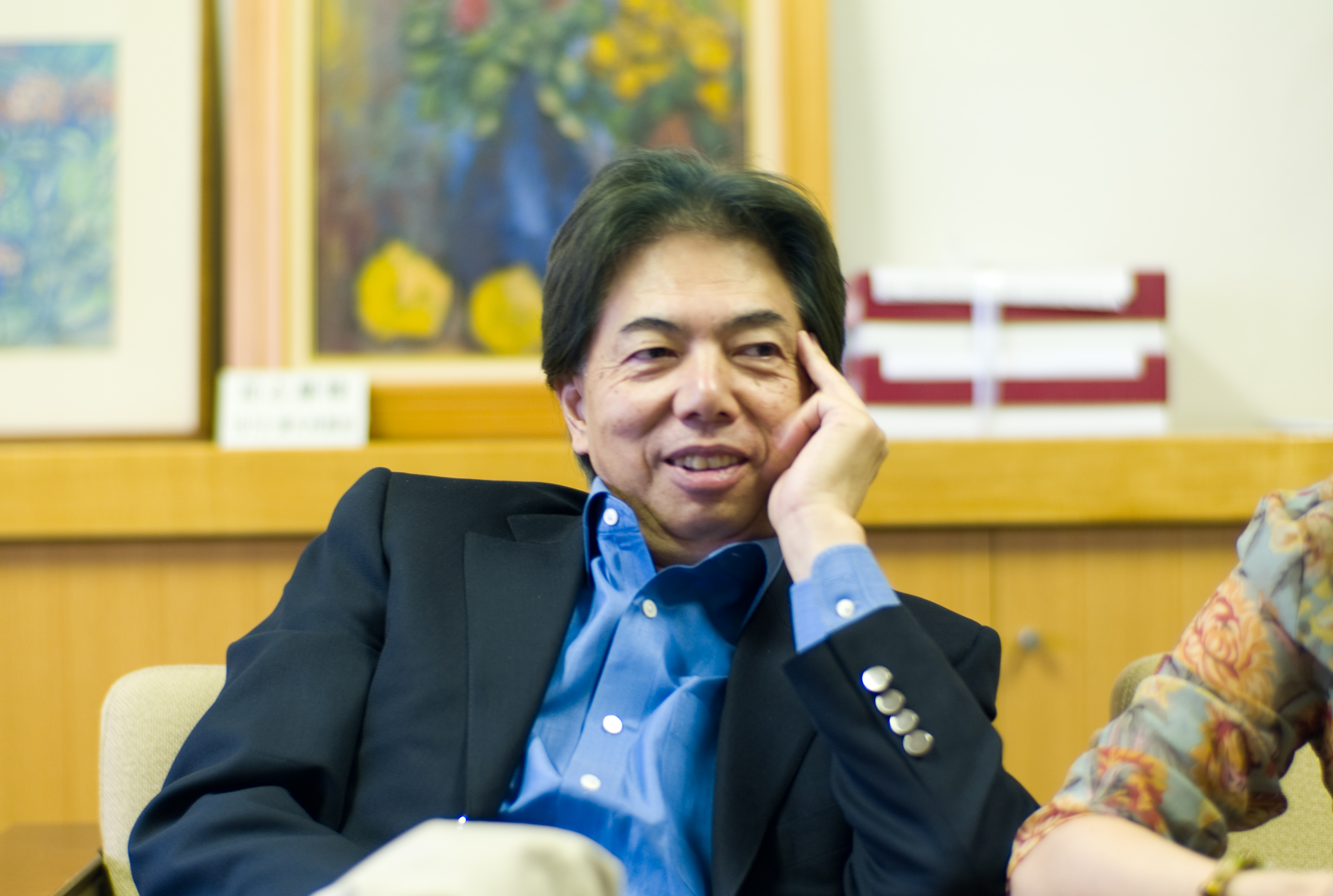 ja:%e7%b1%b3%e6%be%a4%e6˜%8e%e6†%b2|ja Wikipedia article